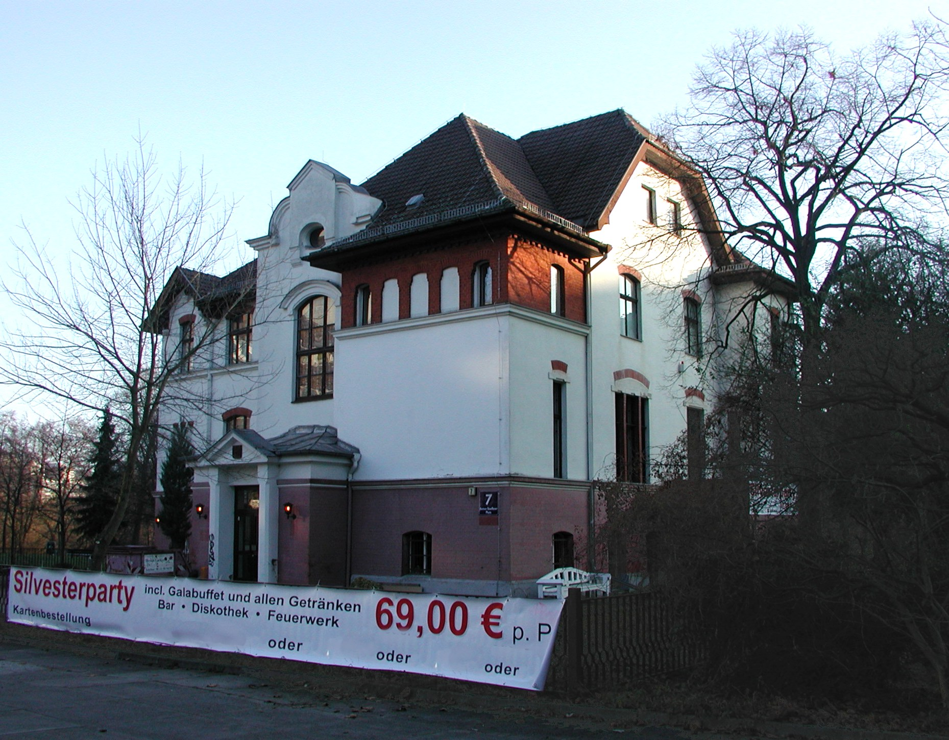 Die eh. Fabrikantenvilla am Fennpfuhlpark im Dezember 2007